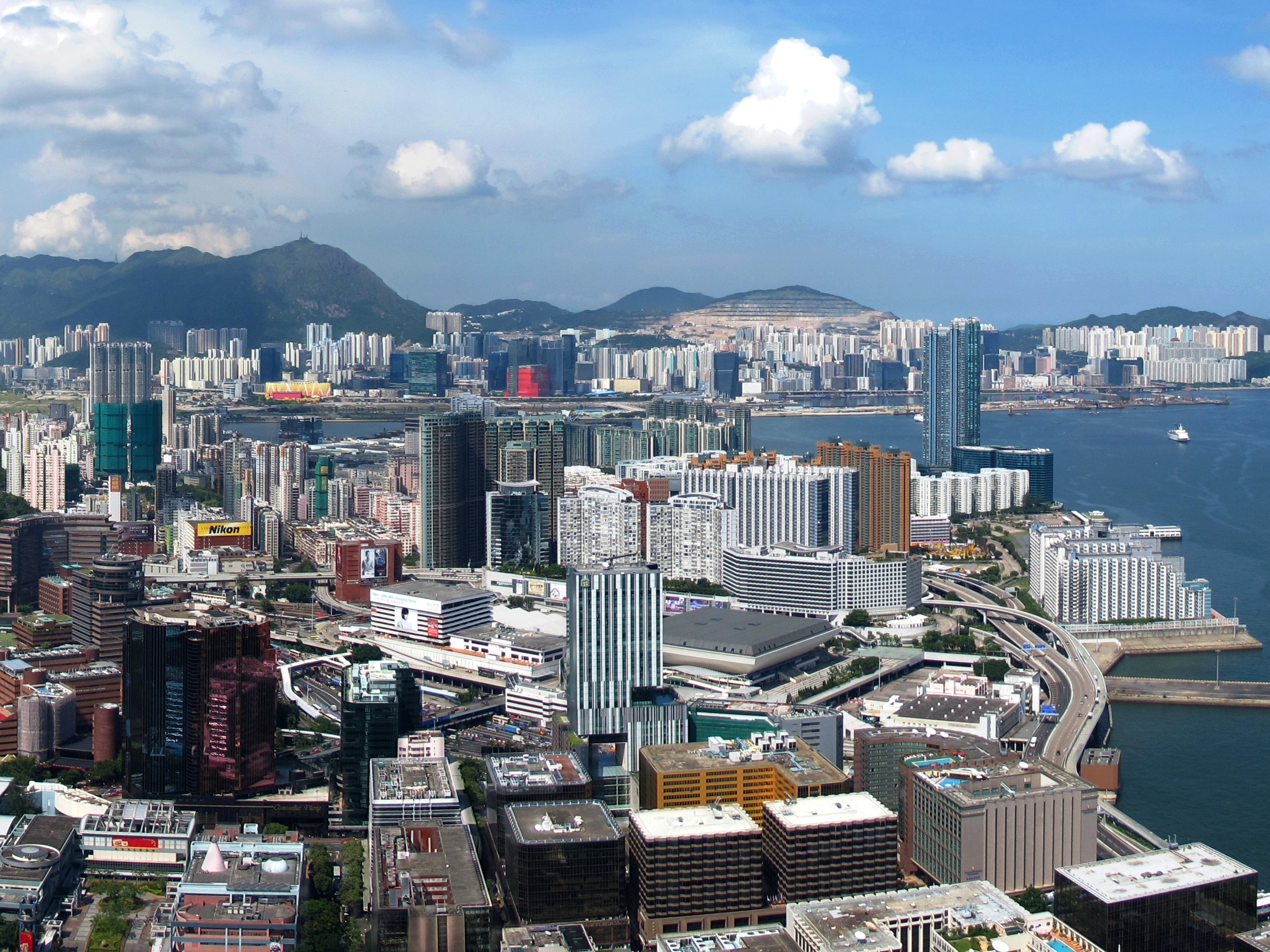 Hung Hum in 2011